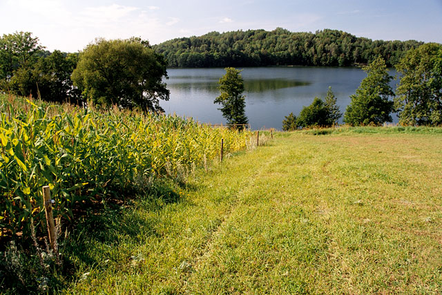 Near the Hańcza Lake, August 2004 Author: Przemysław 'Blueshade' Idzkiewicz. Blueshade Слика:Jezioro Hancza, Poland, Aug 2004.jpg Grafika:Jezioro Hancza, Poland, Aug 2004.jpg